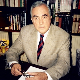 Миодрад Илић, српски књижефник, драмски писац, публицист, новинар, преводилац и педагог